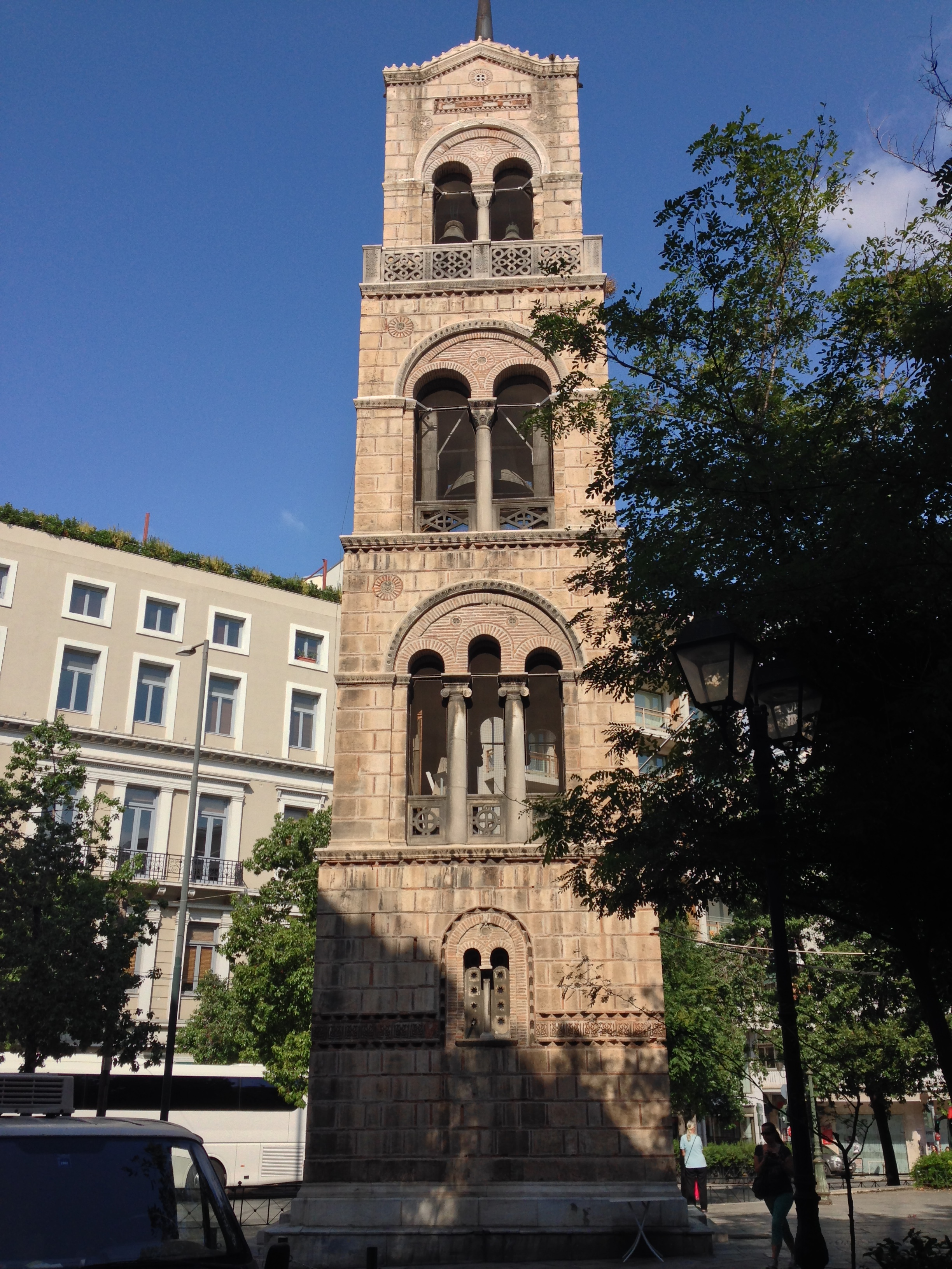 Αγία Τριάδα (Ρωσική Εκκλησία)